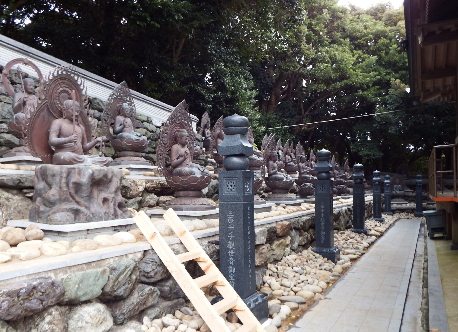 金剛福寺 百八仏と黒田杏子献燈十二句碑